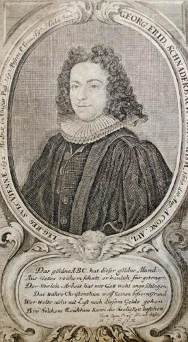 Ev. Pfarrer und Propst an St. Petri in Berlin